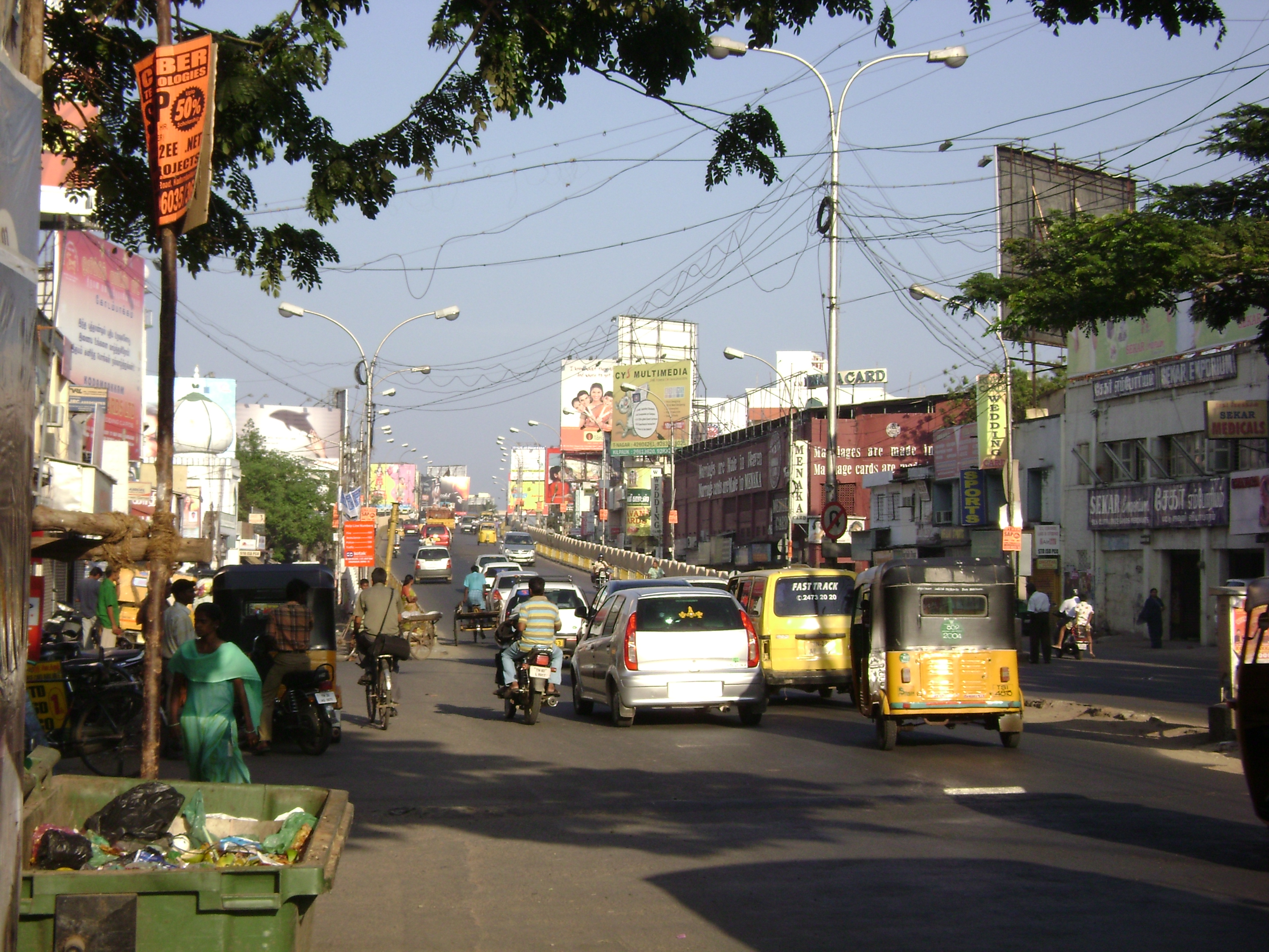 Rail over bridge at Kodambakkam, Chennai